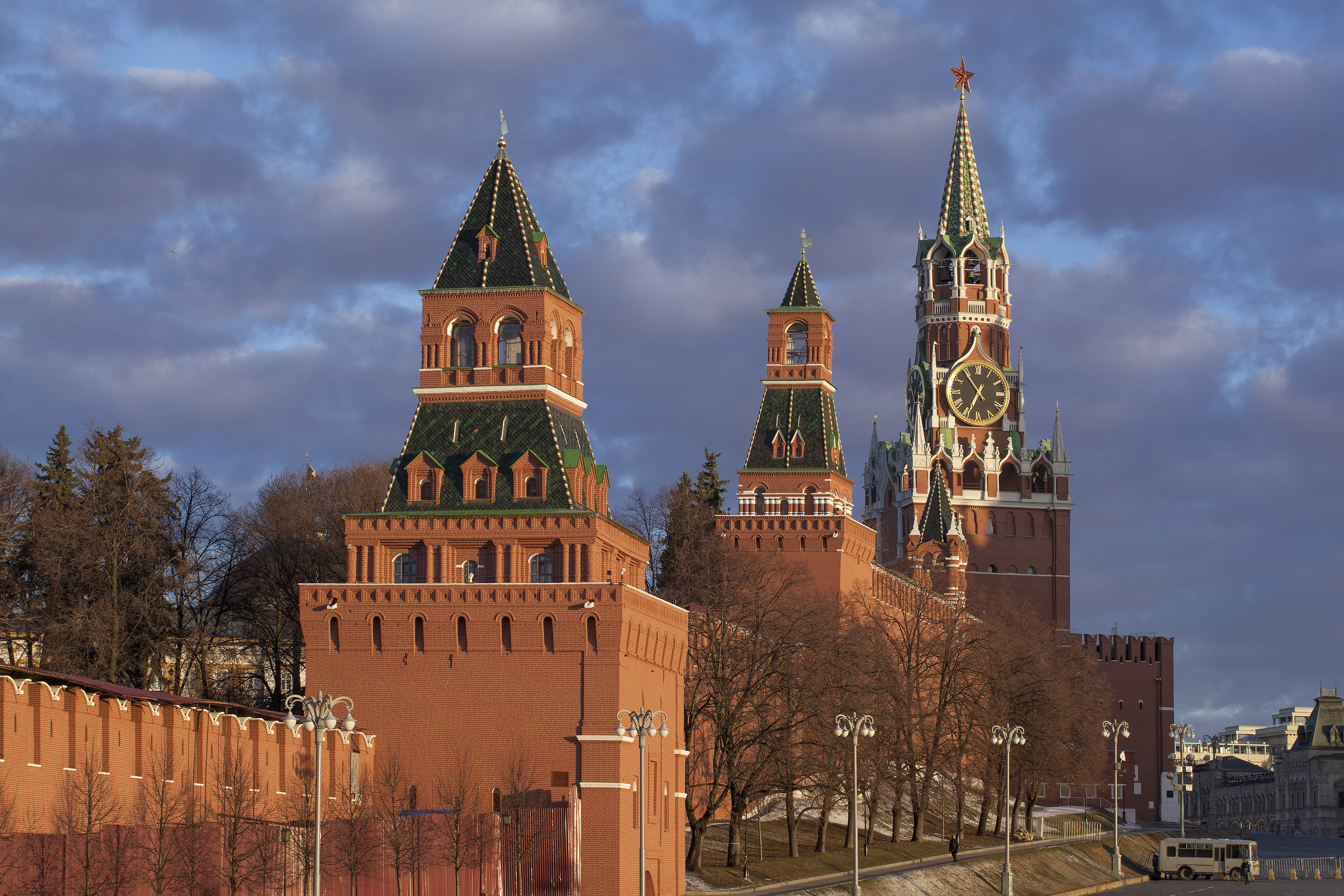 Башни Московского кремля